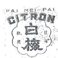 中文（中国大陆）: 南亞食品工业股份有限公司“白梅”商标中文（台灣）: 南亞食品工業股份有限公司“白梅”商標